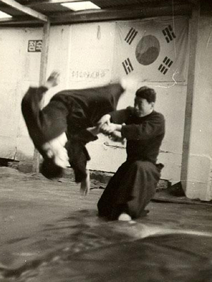 Foto genomen in de jaren 60 in Korea. Twee hapkido beoefenaren. Foto komt uit het persoonlijk fotoalbum van mijn leraar en is met zijn toestemming geplaatst.